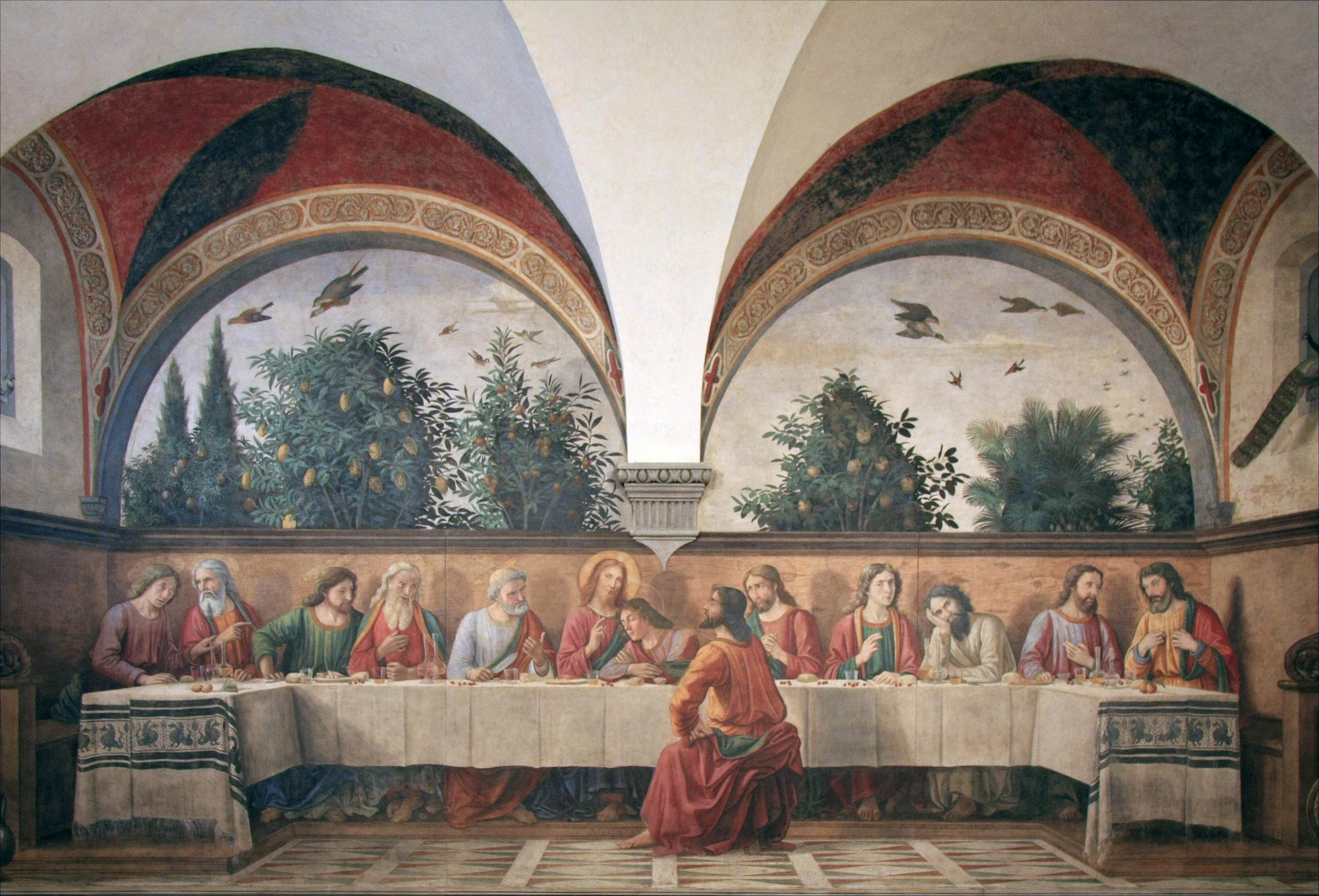 Ognissanti Last Supper